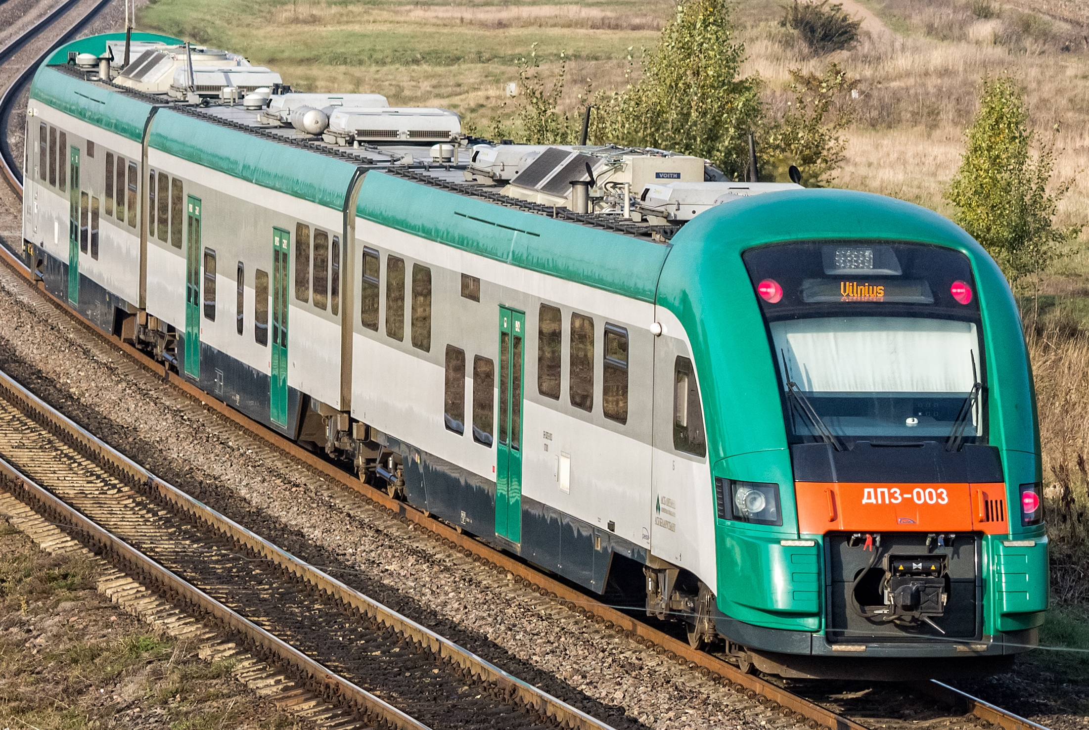 Дизель-поезд ДП3-003 (Pesa 730M) следующий по маршруту Минск - Вильнюс, станция Молодечно см. фото 704846 в альбоме автора